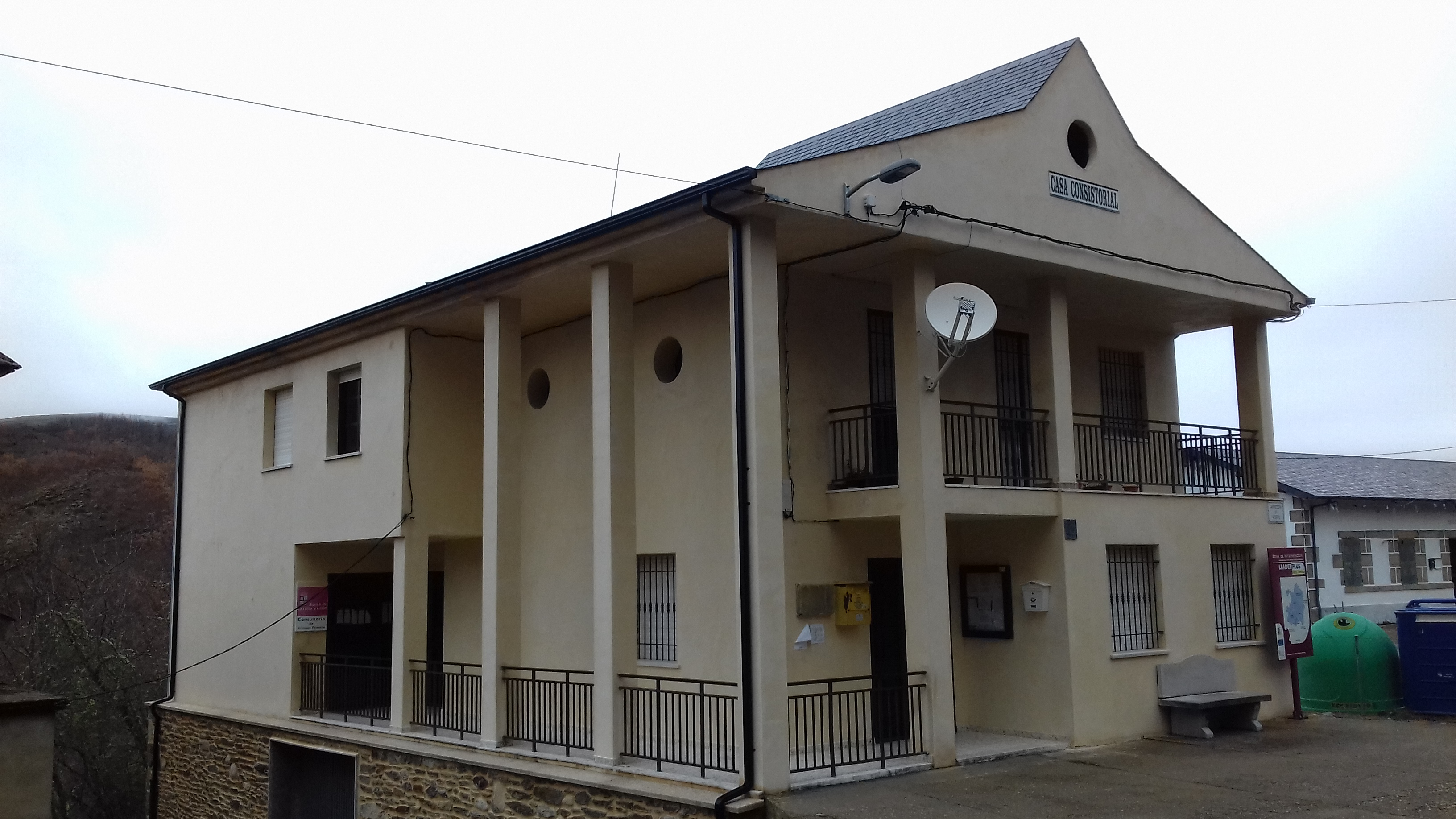 Casa consistorial do concello de Pías